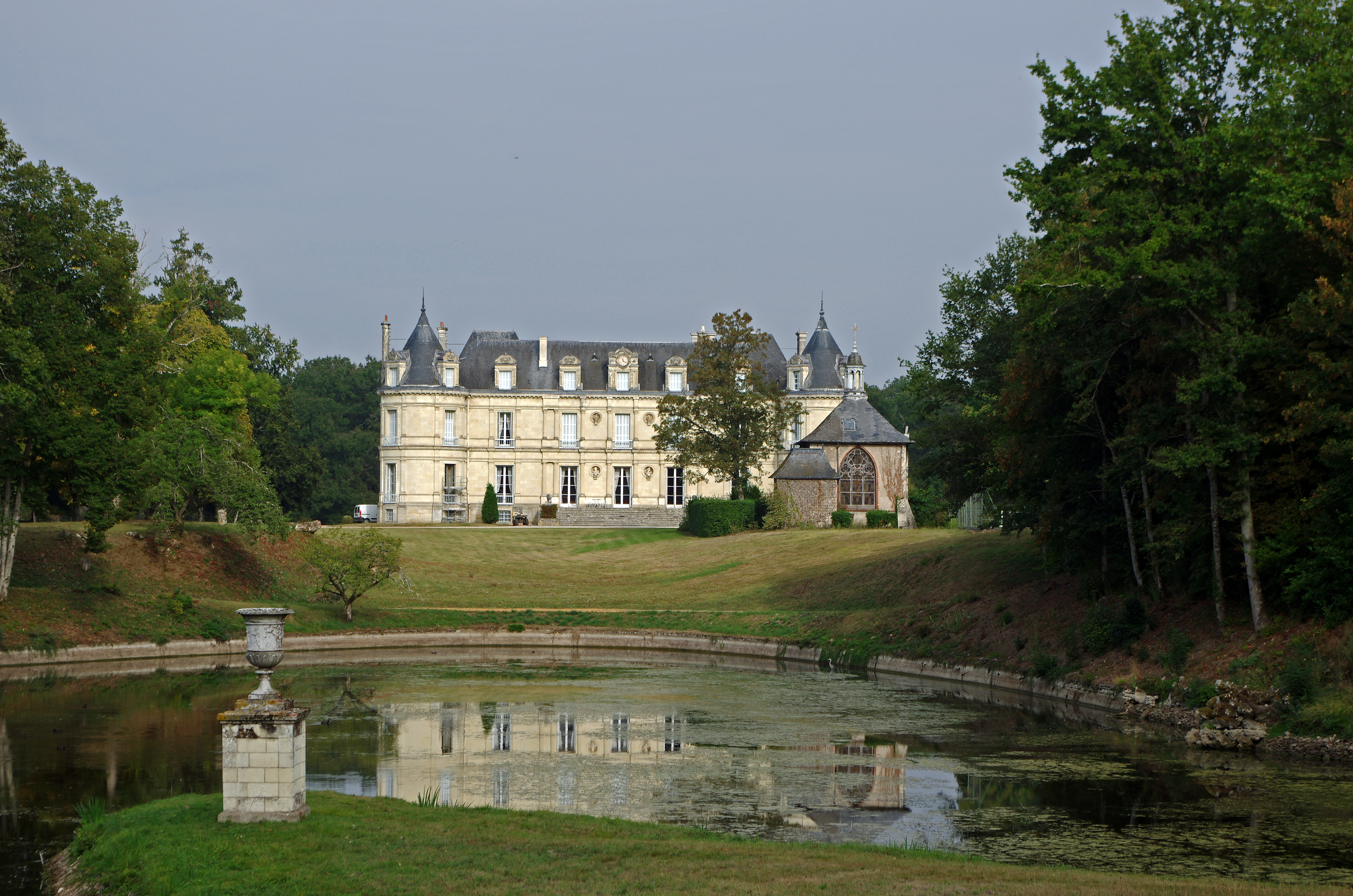 Charentilly (Indre-et-Loire) Château de Poillé (XIXe siècle). Le château a été construit en 1838 pour le maire de Charentilly, Charles Moisant*. L'architecte, Phidias Vestier, a utilisé des matériaux de l'ancien manoir de la Hardillière. Le château a subi deux incendies, en 1915 et 1966. Dans les anciennes dépendances du château de Poillé, au milieu de la forêt, des jeunes en grande difficulté sont accueillis. La famille Moisant a possédé notamment les châteaux de Luynes, Cinq-Mars, Langeais, Perraudière, elle était liée a la famille Goüin, une famille de banquiers de Tours. Pèdre Moisant, propriétaire du château de Poillé, recevra de sa Sainteté Pie IX, sur demande de son ami Mgr Guibert, pour services éminents rendus à l’Église, le titre de comte romain, transmissible à ses neveux et à leur postérité. "Le fait eu lieu à Rome même, où monsieur Moisant se trouvait pour les grandes fêtes célébrées à l'occasion du centenaire de Saint Pierre." (Vie de M. Dupont. Mort a Tours en odeur de sainteté, le 18 mars 1876 d'apr?s .Par M.l'abbé Janvier). Le comte Pèdre Moisant, par ses dons, permettra de racheter nombre de maisons de Tours, dans la recherche du tombeau de Saint-Martin. Le tombeau sera retrouvé en 1860